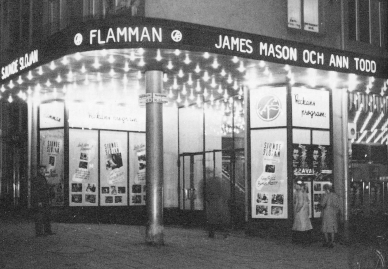 Biografen "Flamman" (entrén) på Södermalm i Stockholm. Sjunde slöjan (The Seventh Veil) står på reperoaren, 1946.